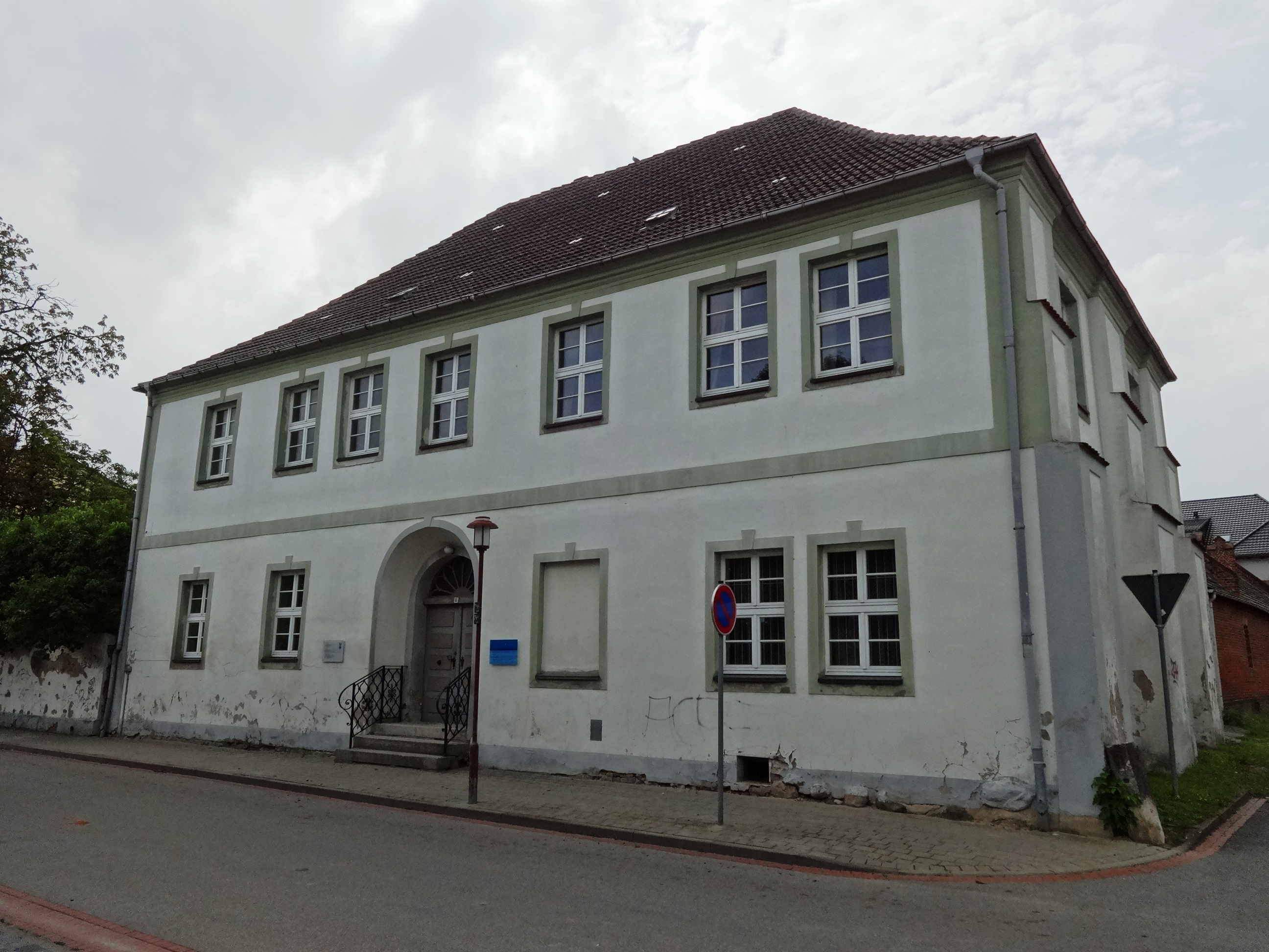 Denkmalgeschütztes Jagdhaus der Pommernherzöge in Pasewalk, Mecklenburg-Vorpommern